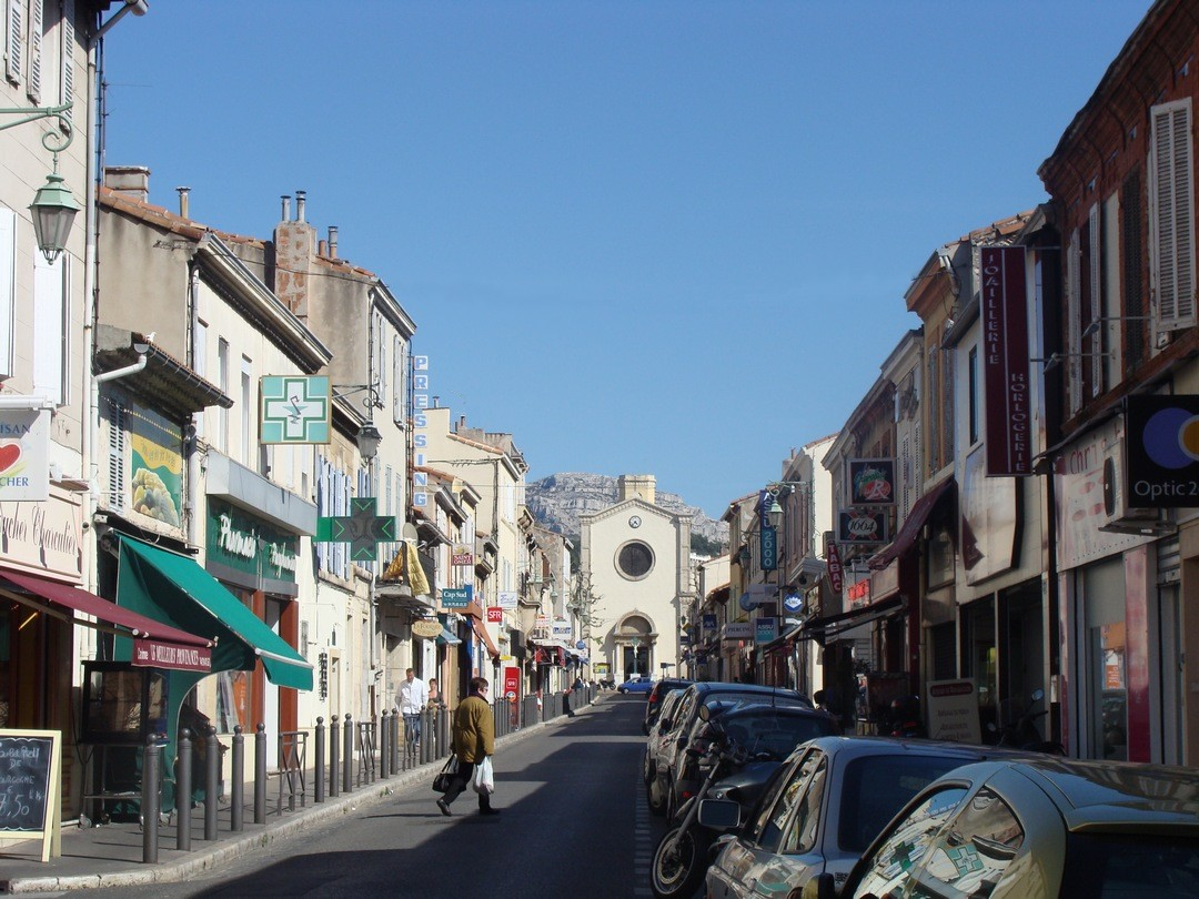 La rue centrale du vieux village de Mazargues, à Marseille ; au fond, l'église Saint-Roch, et, par derrière, le massif des calanques.